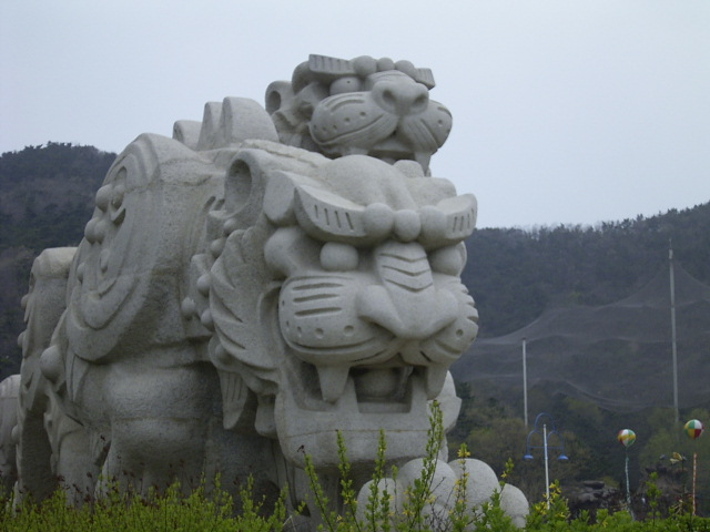 中国・大連市の老虎灘にある虎の彫刻の頭部アップです